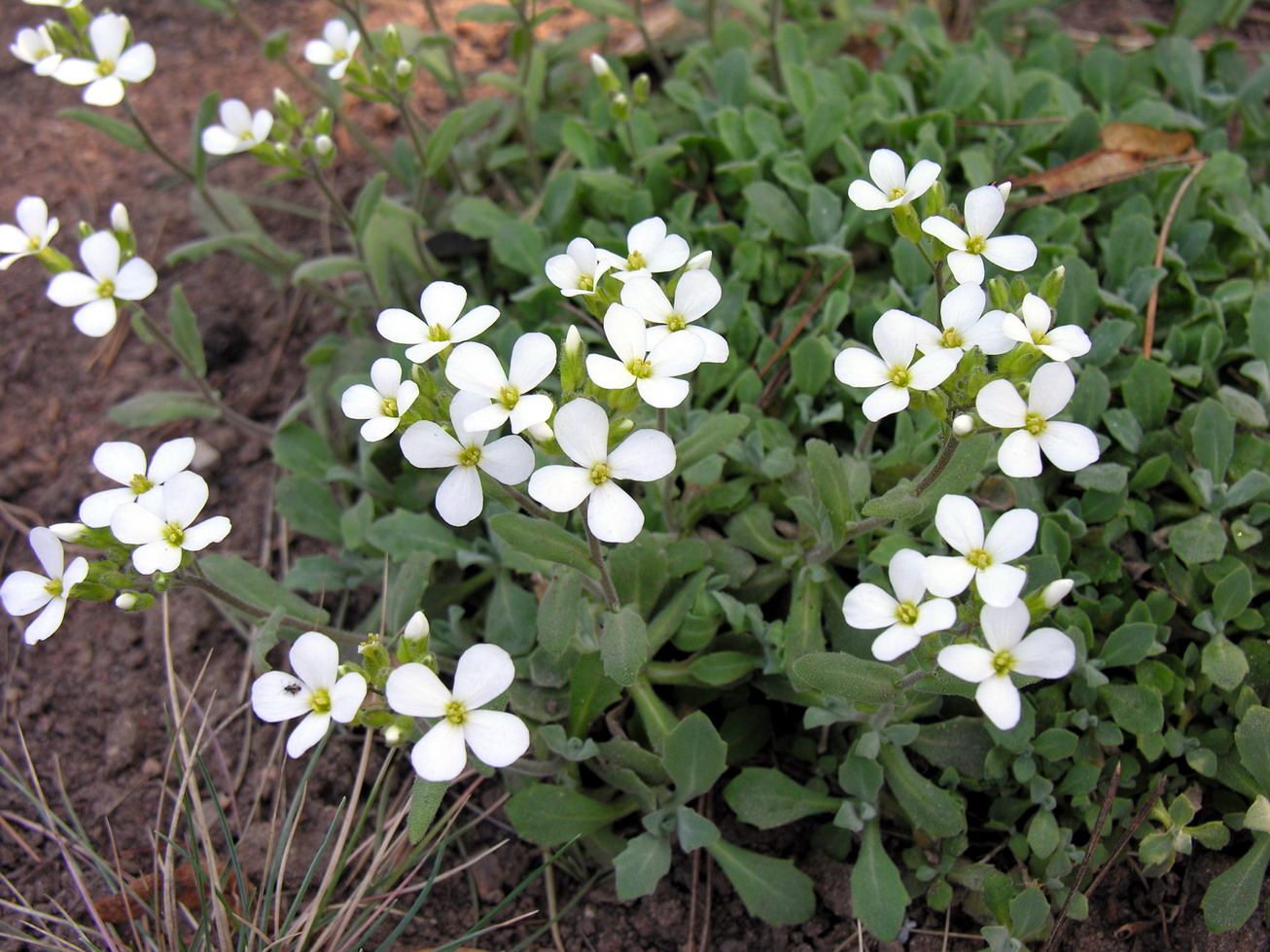 Kaukazinis vaistutis (Arabis caucasica) Šeima. Bastutiniai (Brassicaceae) Fotografavo: Algirdas, 2006 m. gegužės 3 d.